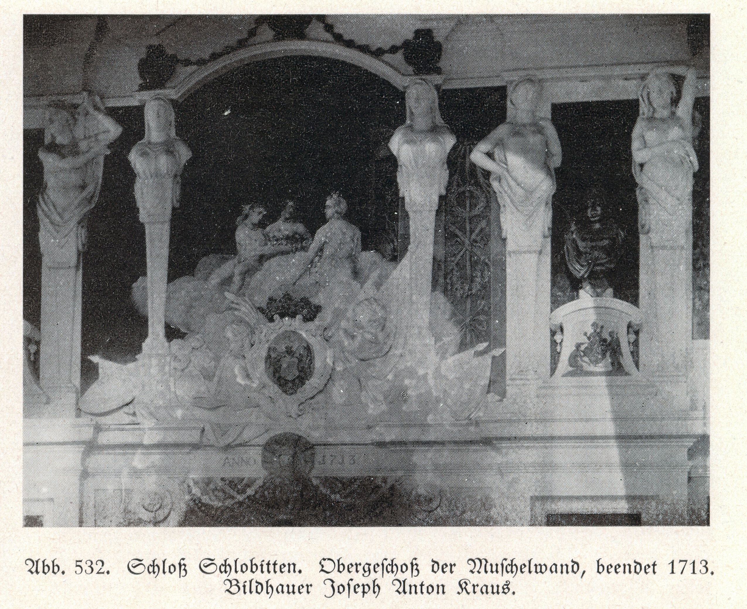 Schloss Schlobitten, Obergeschoss der Muschelwand, 1713, Bildhauer Joseph Anton Kraus